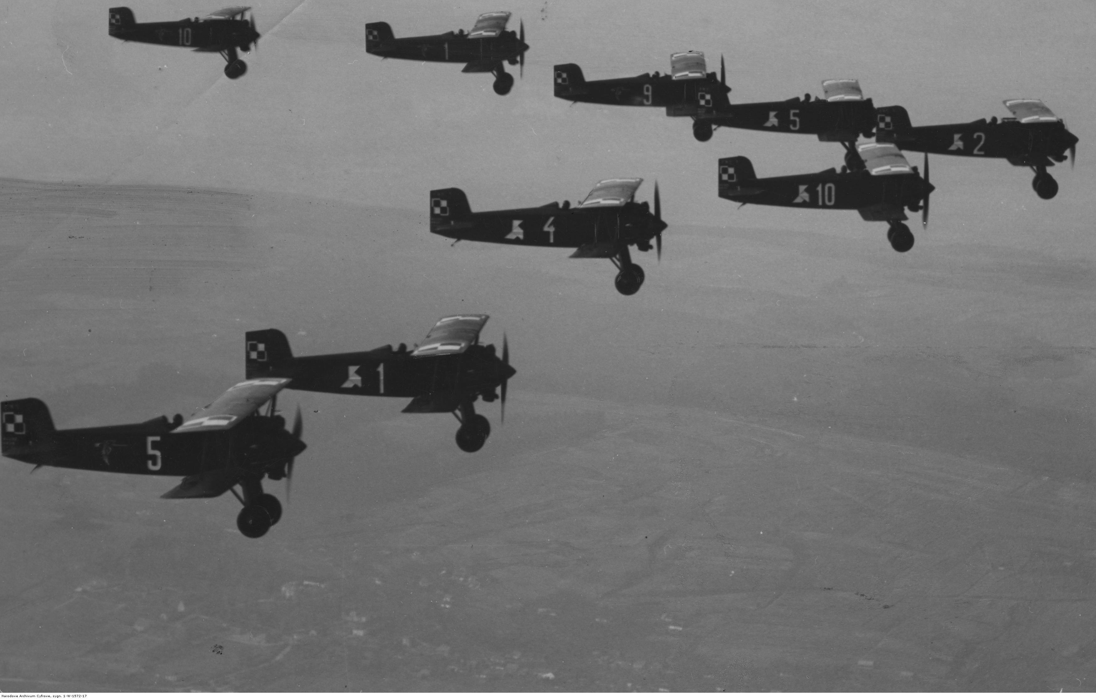 Święto 2 pułku lotniczego w Krakowie - samoloty 121 i 122 eskadry myśliwskiej w locie. Koncern Ilustrowany Kurier Codzienny - Archiwum Ilustracji. Sygnatura: 1-W-1572-17